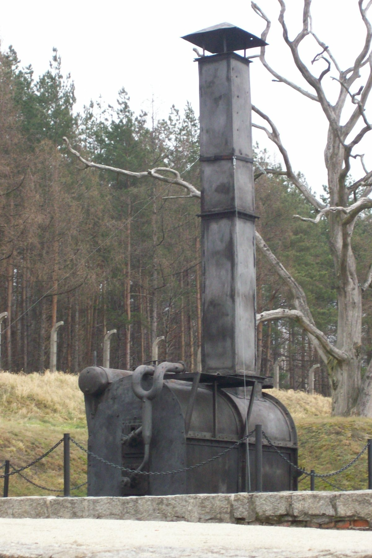 Piec krematoryjny znajdujący się w Muzeum Gross-Rosen